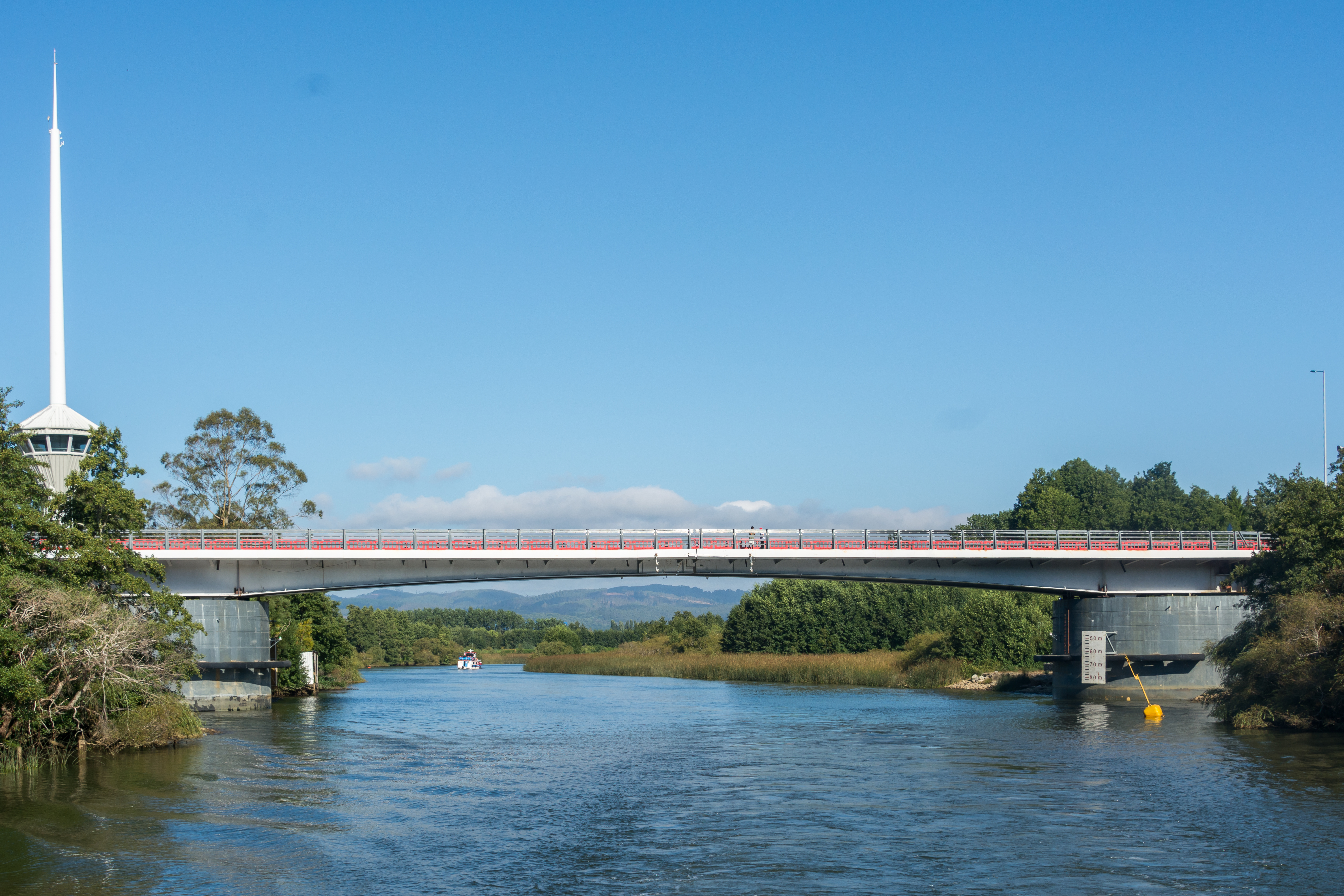 Puente Caucau, Valdivia, Región de Los Ríos, Chile.